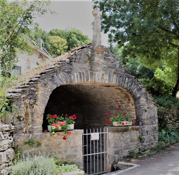 Oratoire Notre Dame - Montvalent © PY Redon Oratoire à couverture en lauzes sauvé de disparition en 1981 par Louis Blanchard et la Sauvegarde de Martel